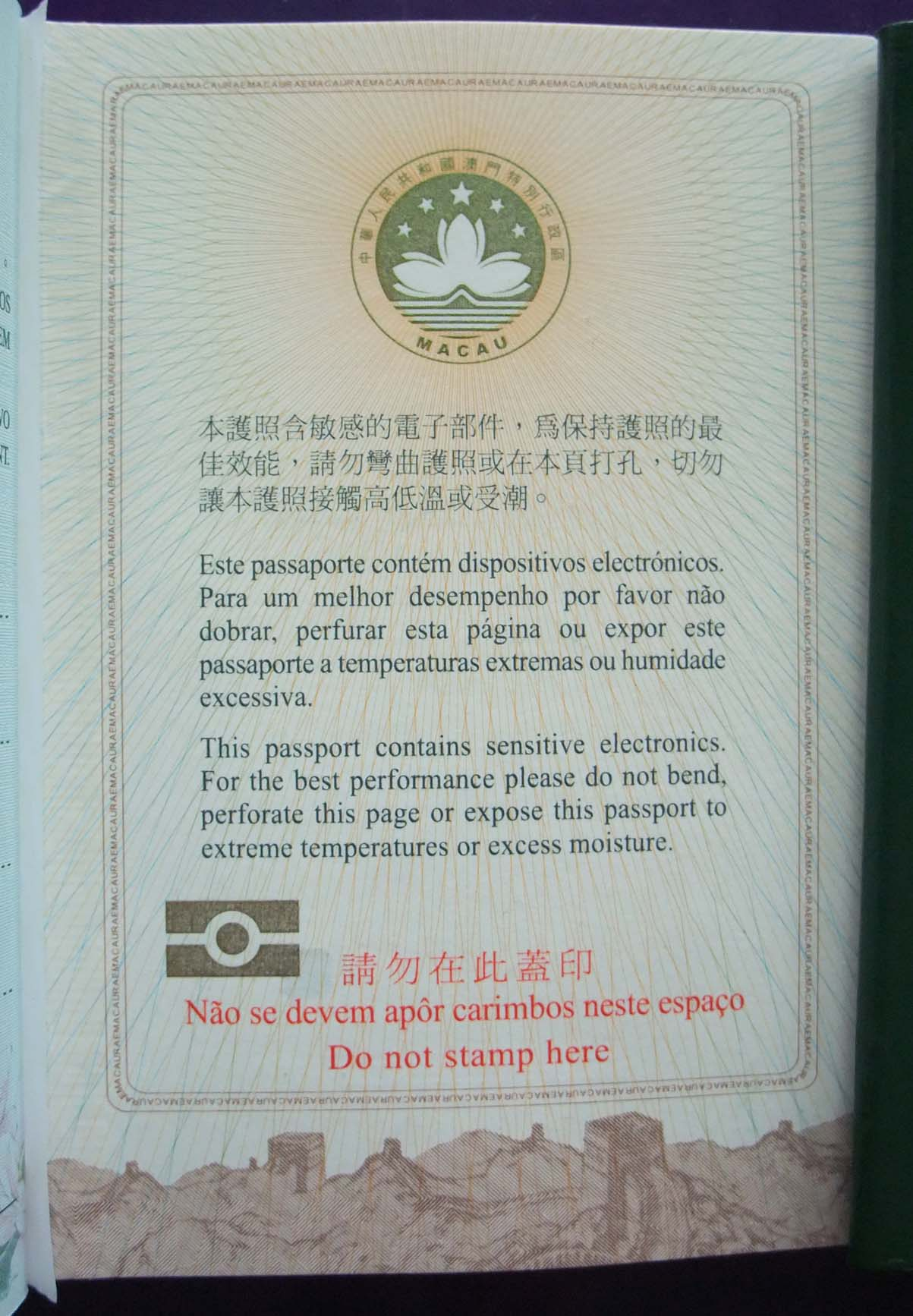 中文（香港）: 澳門特別行政區電子護照封底。封底則內置非接觸式晶片，注意事項以中、葡、英三語標示。